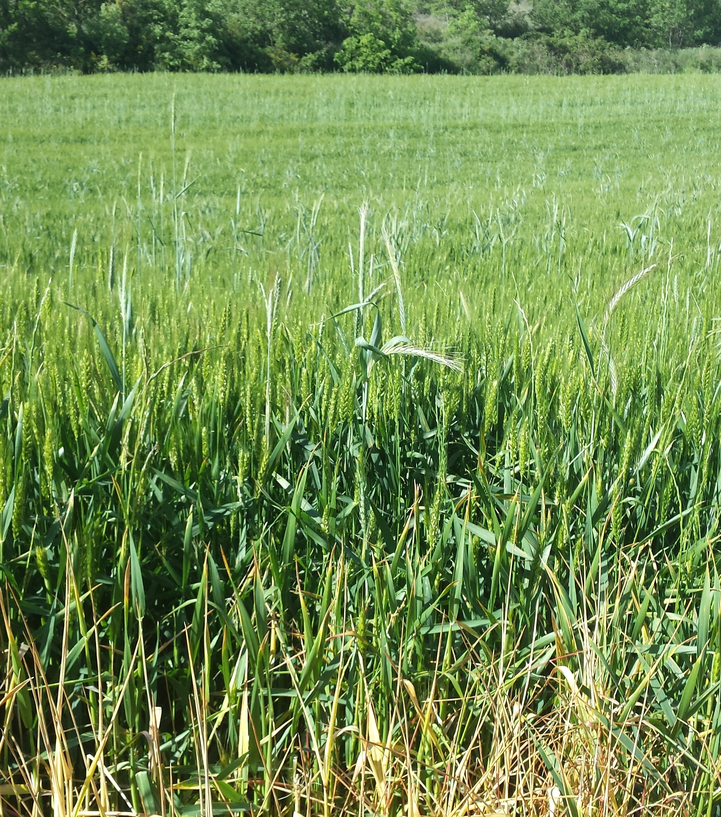 Mestall amb mescla cultivada de blat i sègol